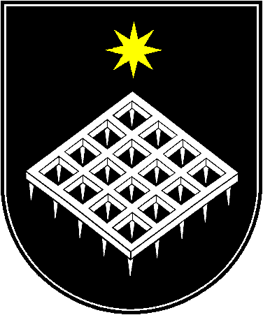 Žarėnų herbas